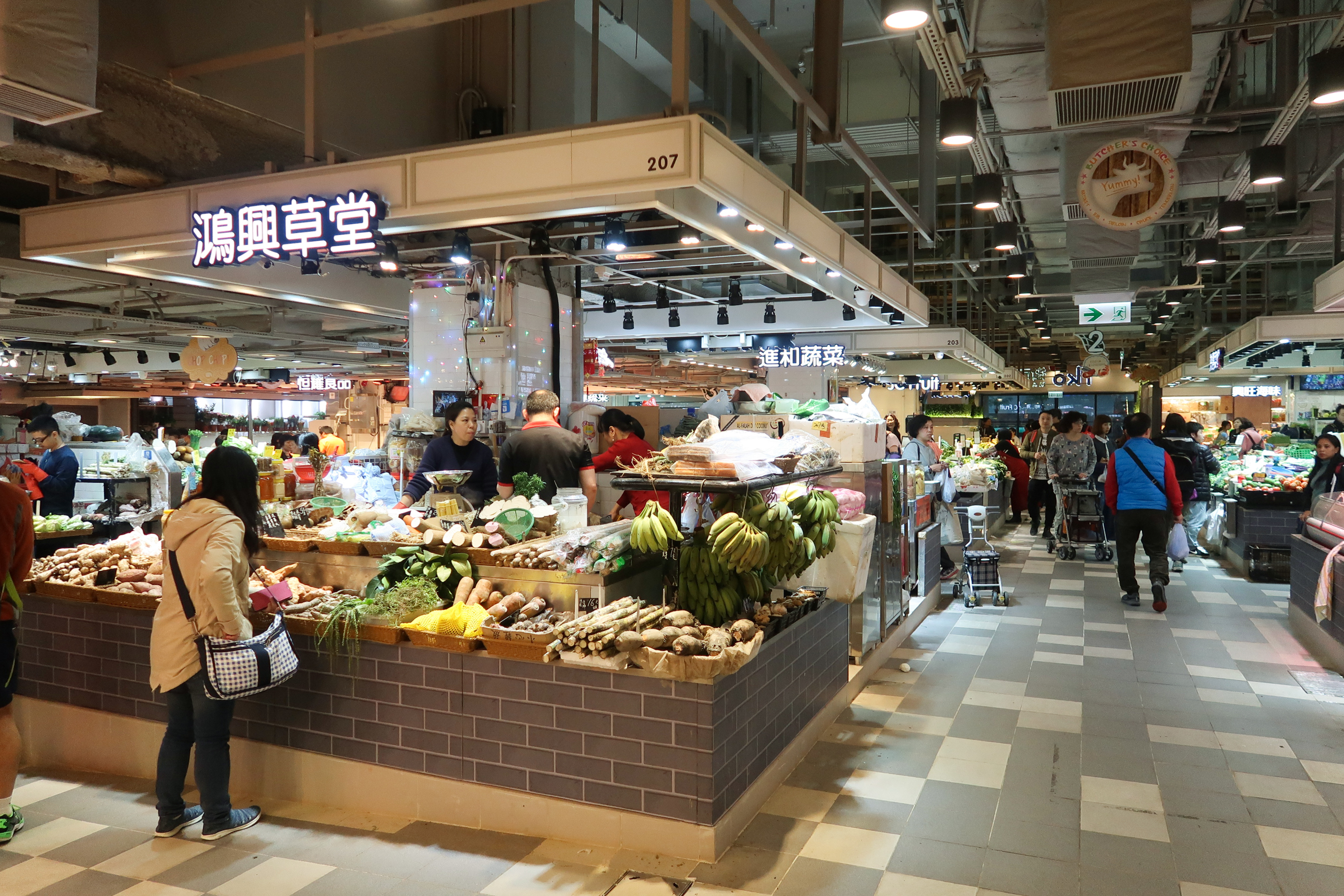 TKO Market